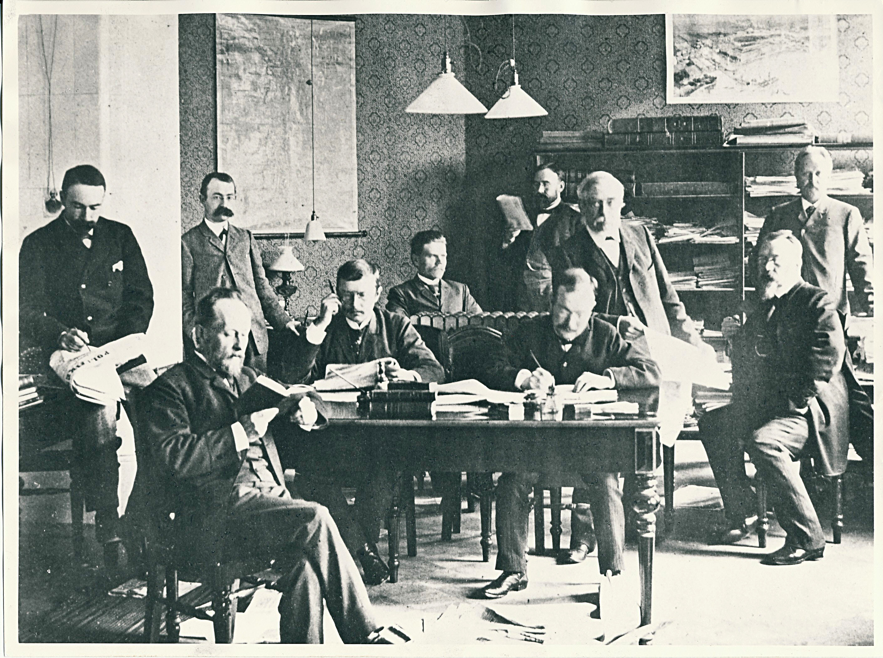 Sanomalehti Uuden Suomettaren toimituskunta vuonna 1889.